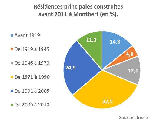 Part logement par année